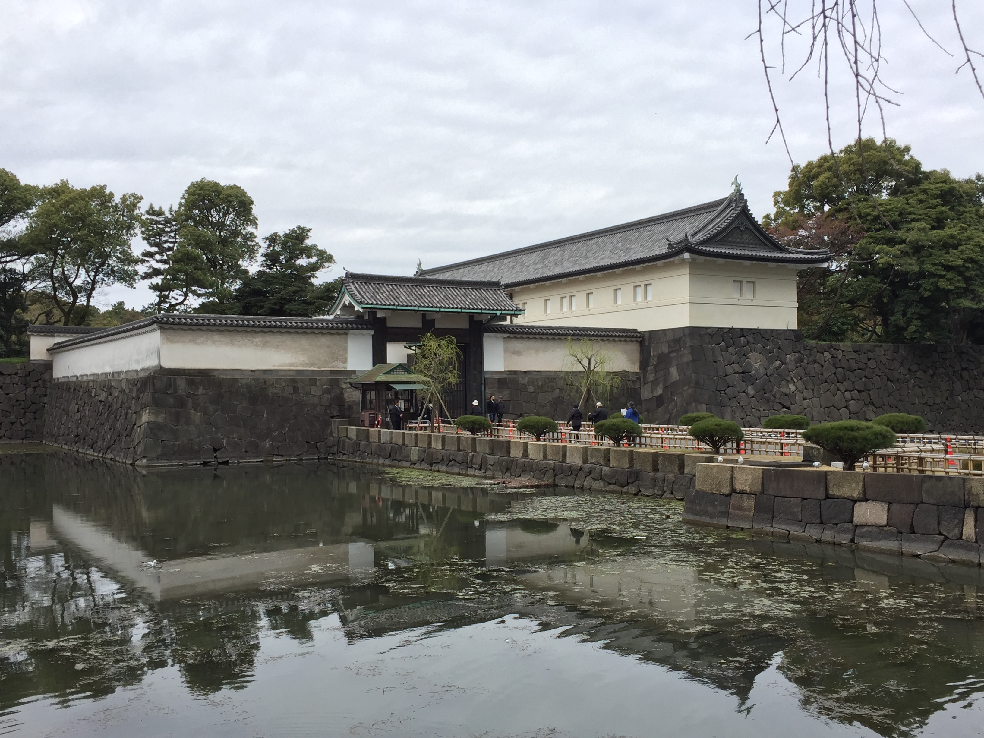 旧江戸城 大手門（一部焼失再建）